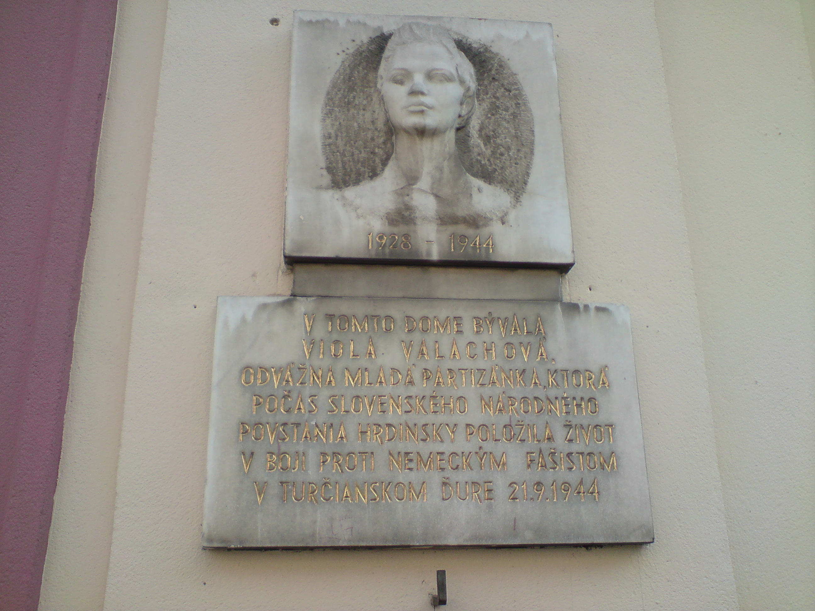 Viola Valachová house, Bratislava